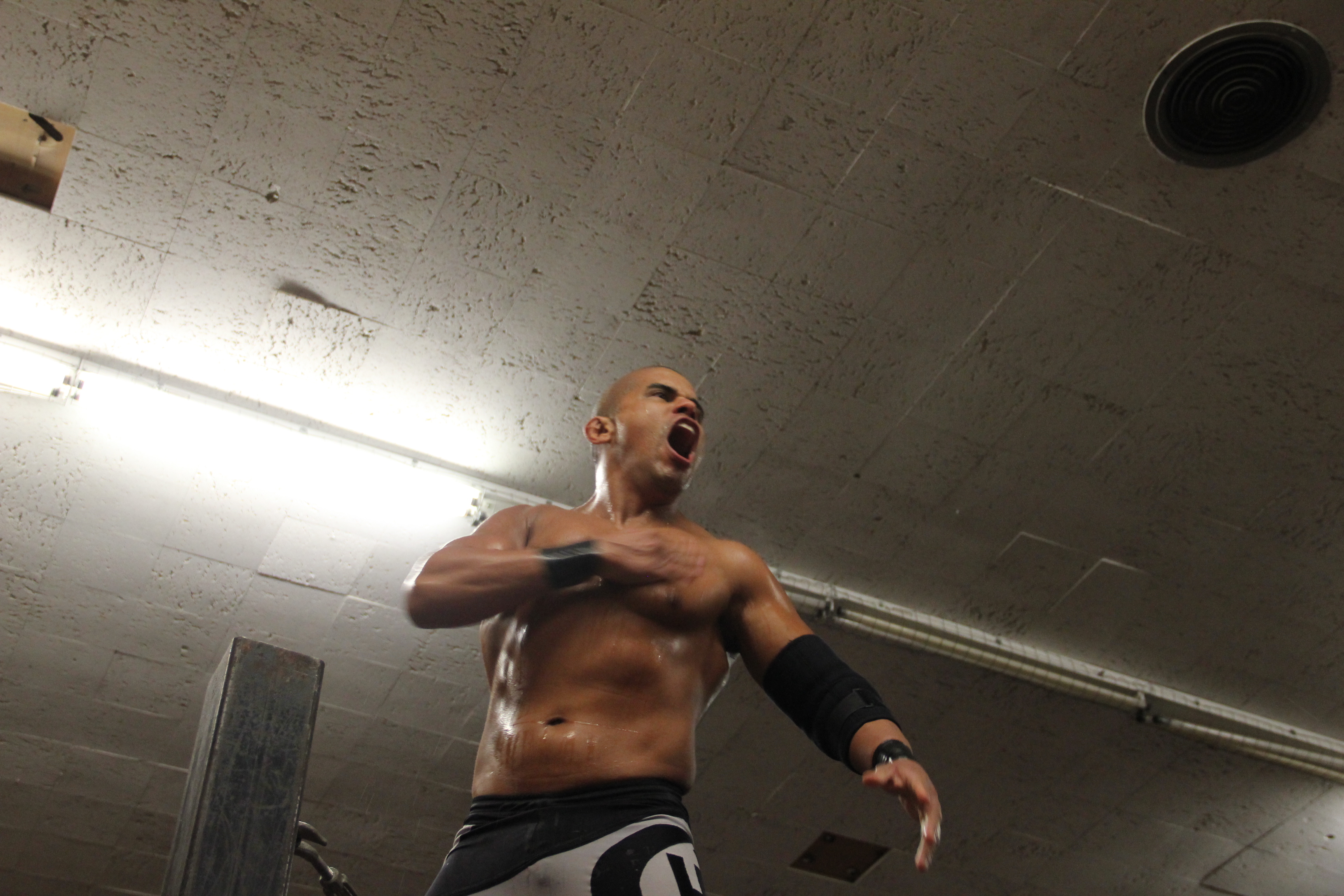 2013-05-05T08:10:31.382